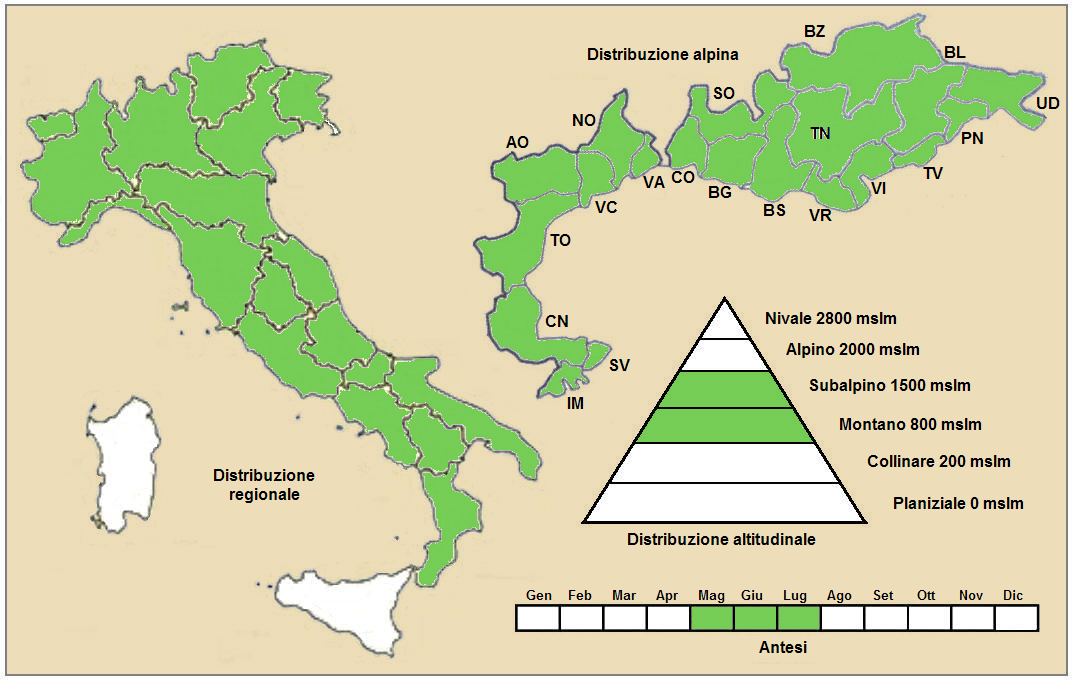 Thalictrum aquilegiifolium - Distribuzione